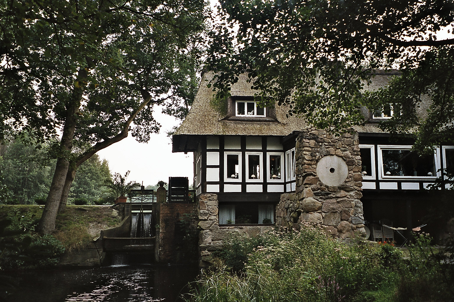 Wassermühle "Neumühle" in Endel (Gemeinde Visbek)